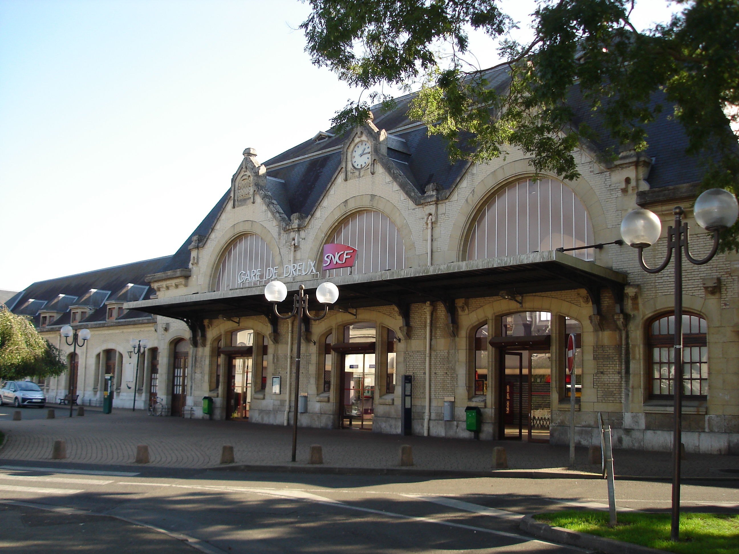 Gare de Dreux (28) : Le bâtiment voyageurs.